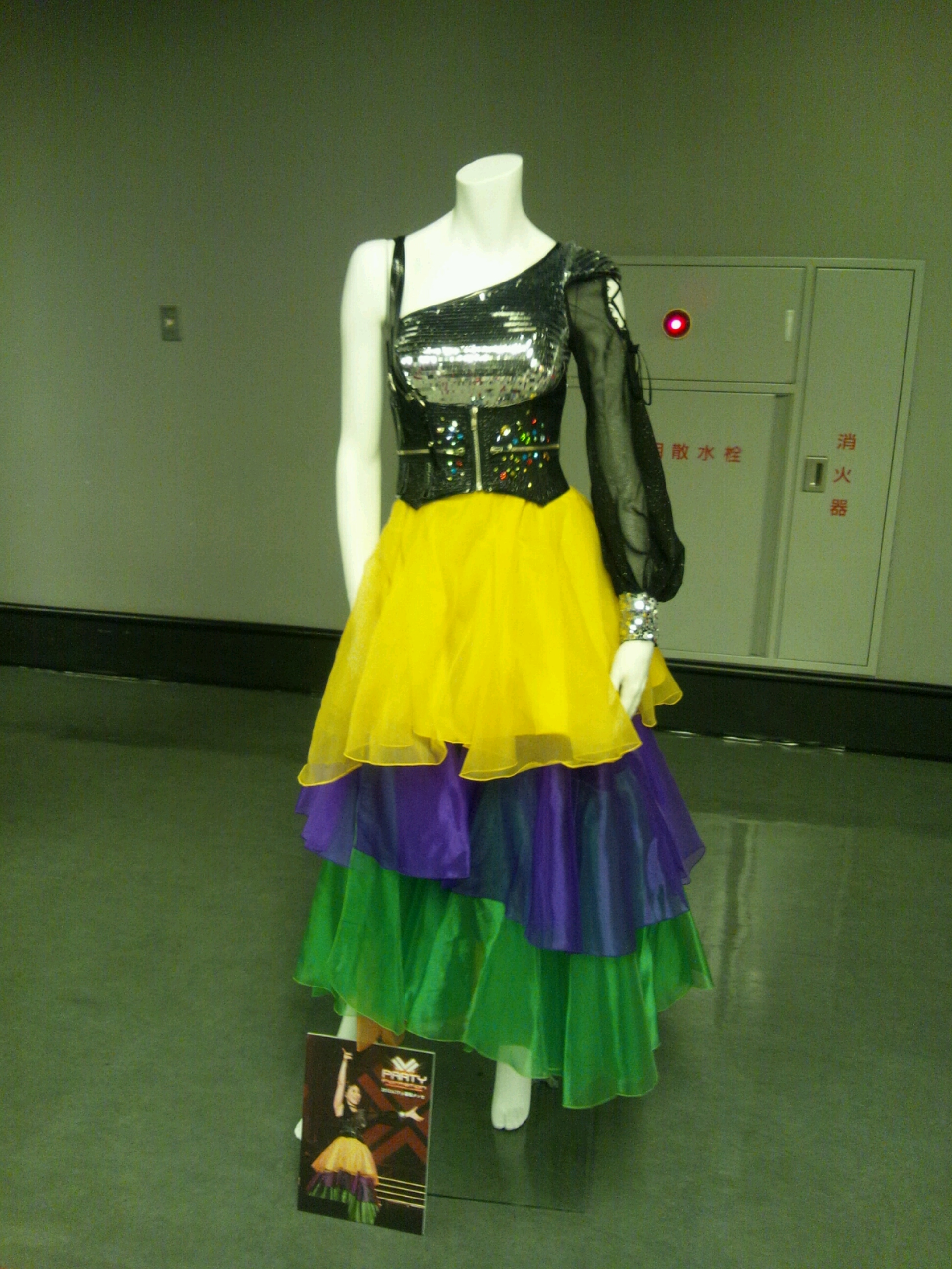 アニメロミックス Presents Minori Chihara Birthday Live 2012 supported by JOYSOUND 衣装展覧会より『Minori Chihara Live 2012 PARTY-Formation』の衣装。